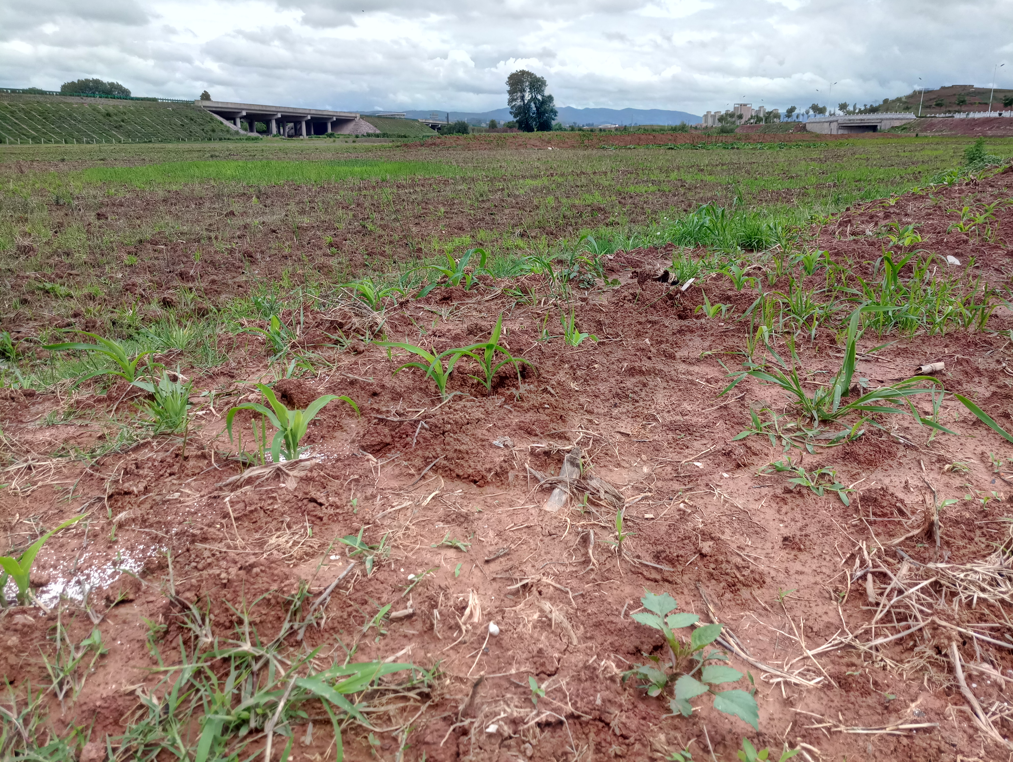 中文（中国大陆）: 石林县的农田